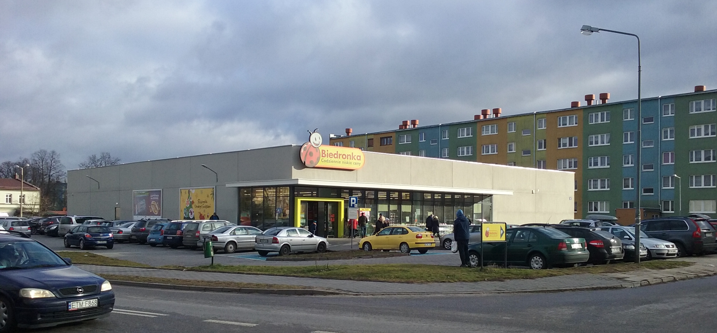 Biedronka protugalskiego Jeronimo Martins w 60-tysięcznym Tomaszowie Mazowieckim, w województwie łódzkim Ul. Wandy Panfil 1/3